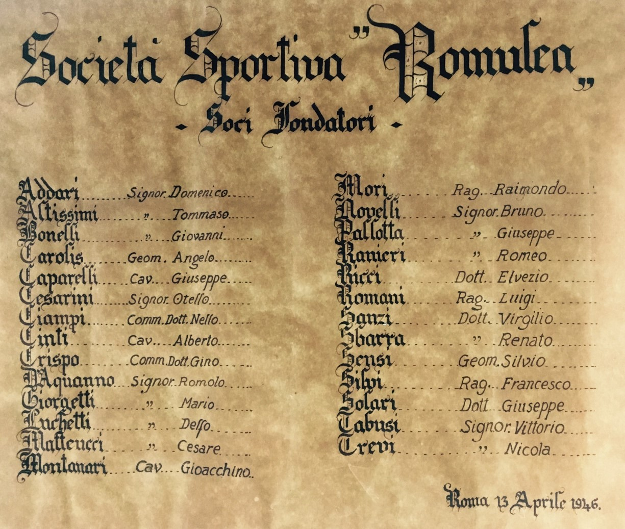 La carta dei soci fondatori della SS Romulea datata 13 aprile 1946